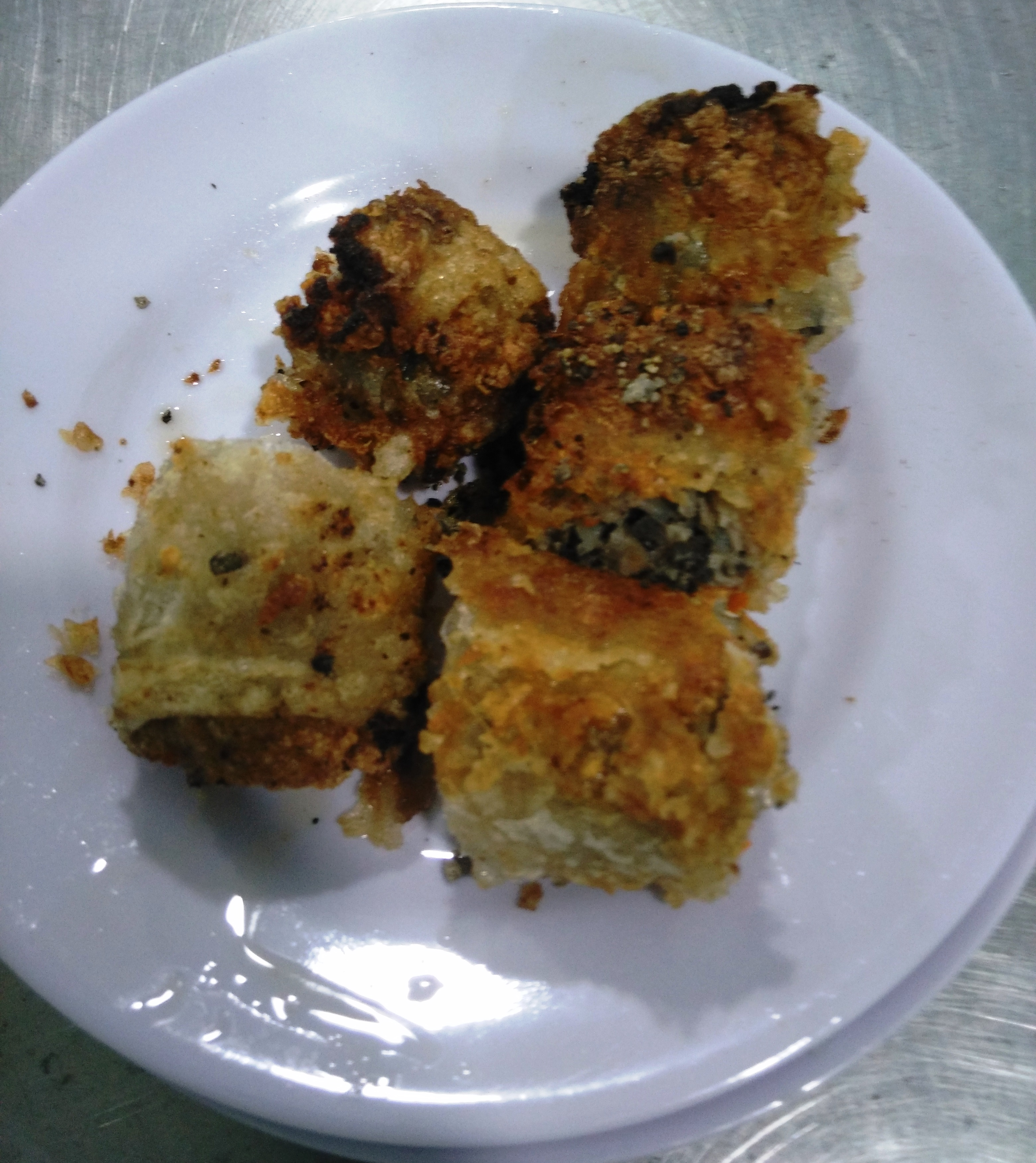 Nem cua bể Hà Nội tại Nguyễn Sơn, Tân Phú, tháng 9 năm 2018